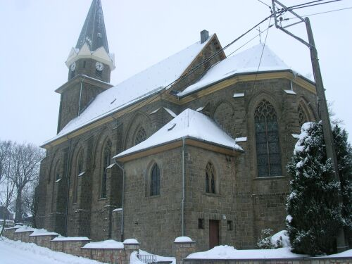 vue de l'église de Hünningen